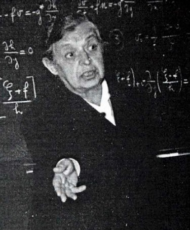 Giuseppina Aliverti